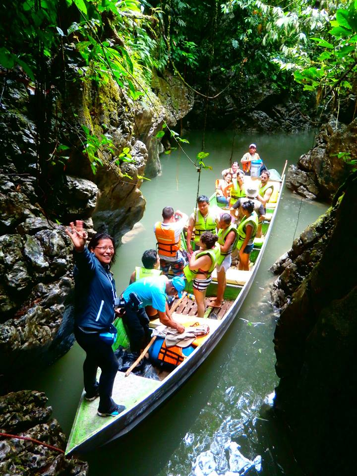 situado en el distrito de Huicungo